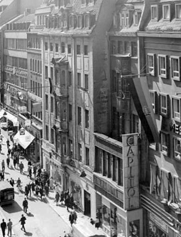 Die Petersstraße in Leipzig mit dem Haus Zum Grönländer